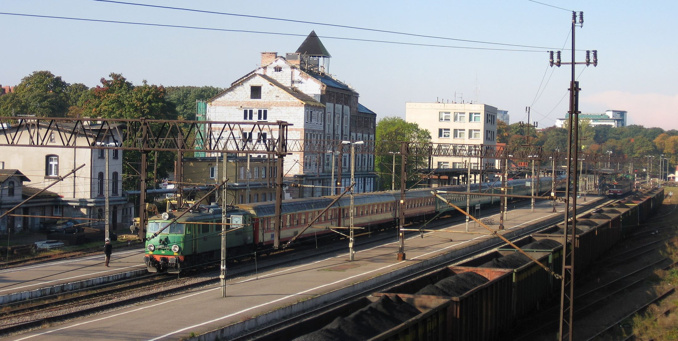 Perony w Kołobrzegu